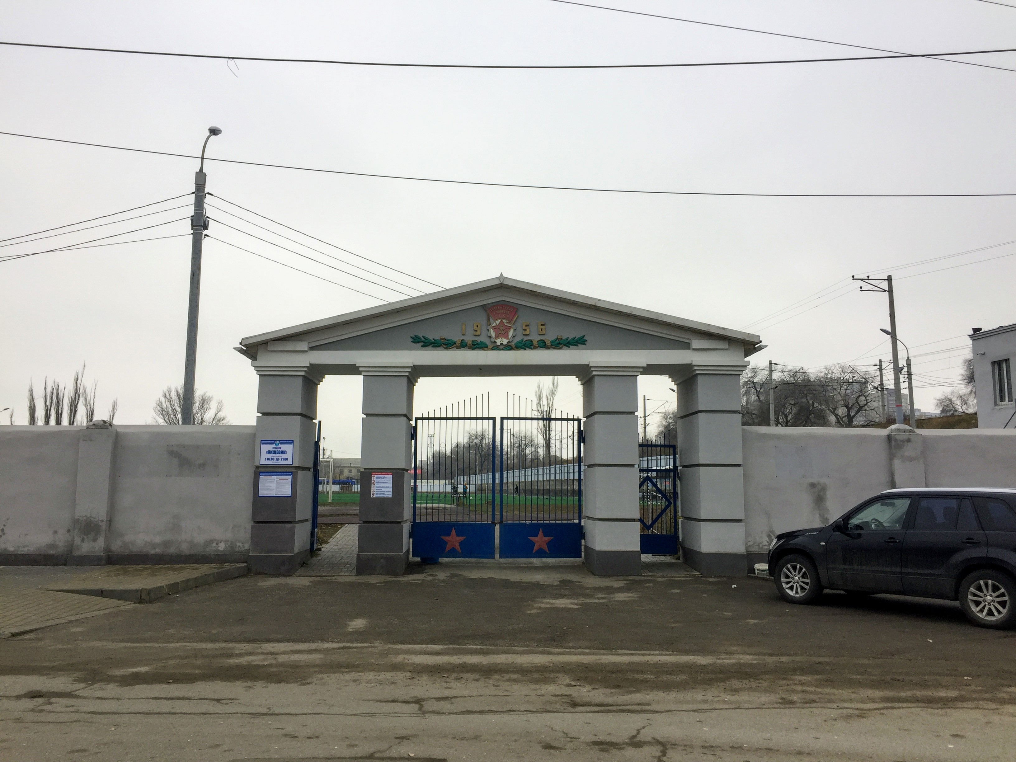 Стадион Пищевик, Волгоград. Входная группа